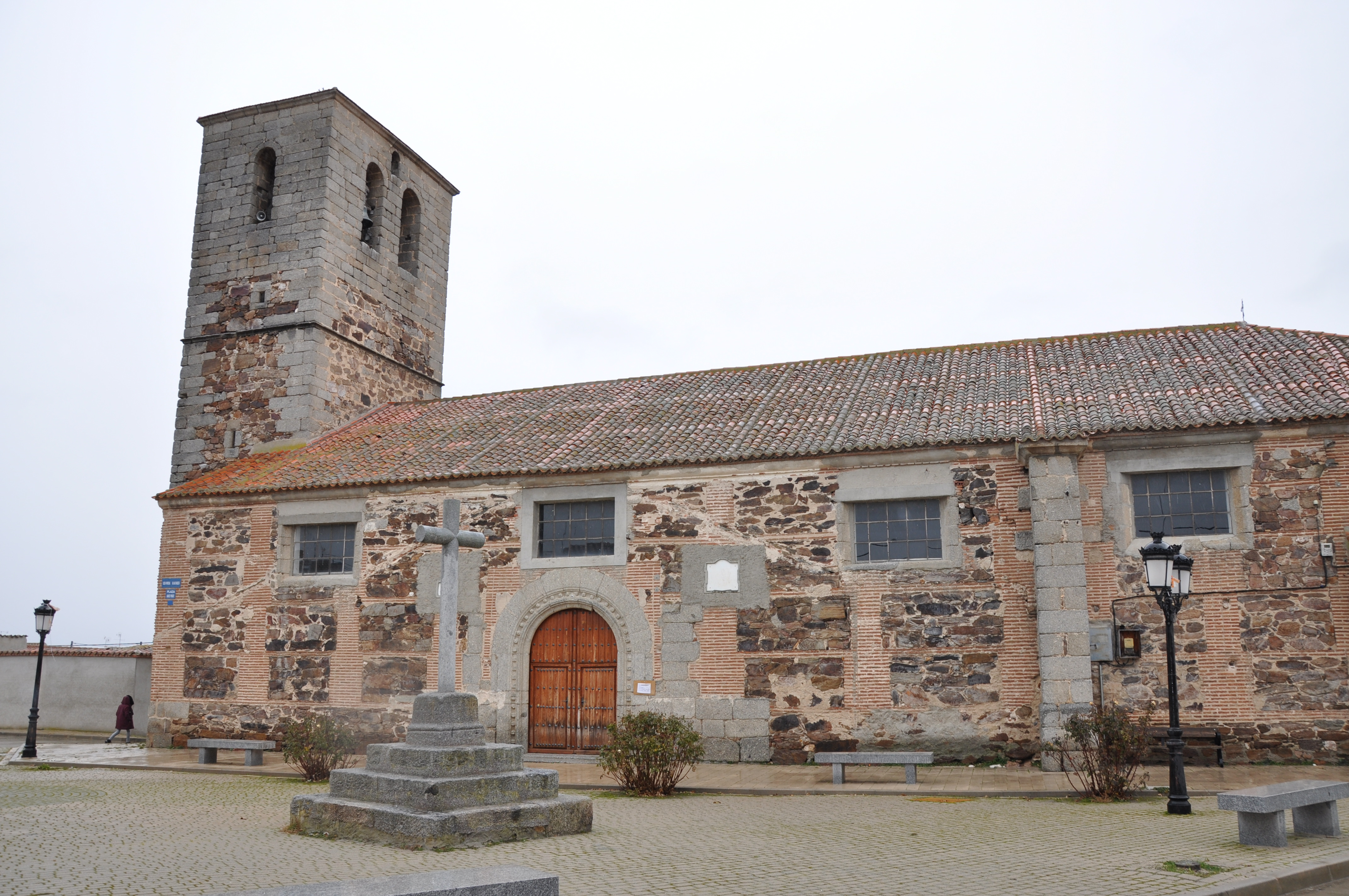 Iglesia de San Juan evangelista, Herreros de Suso, Ávila, España